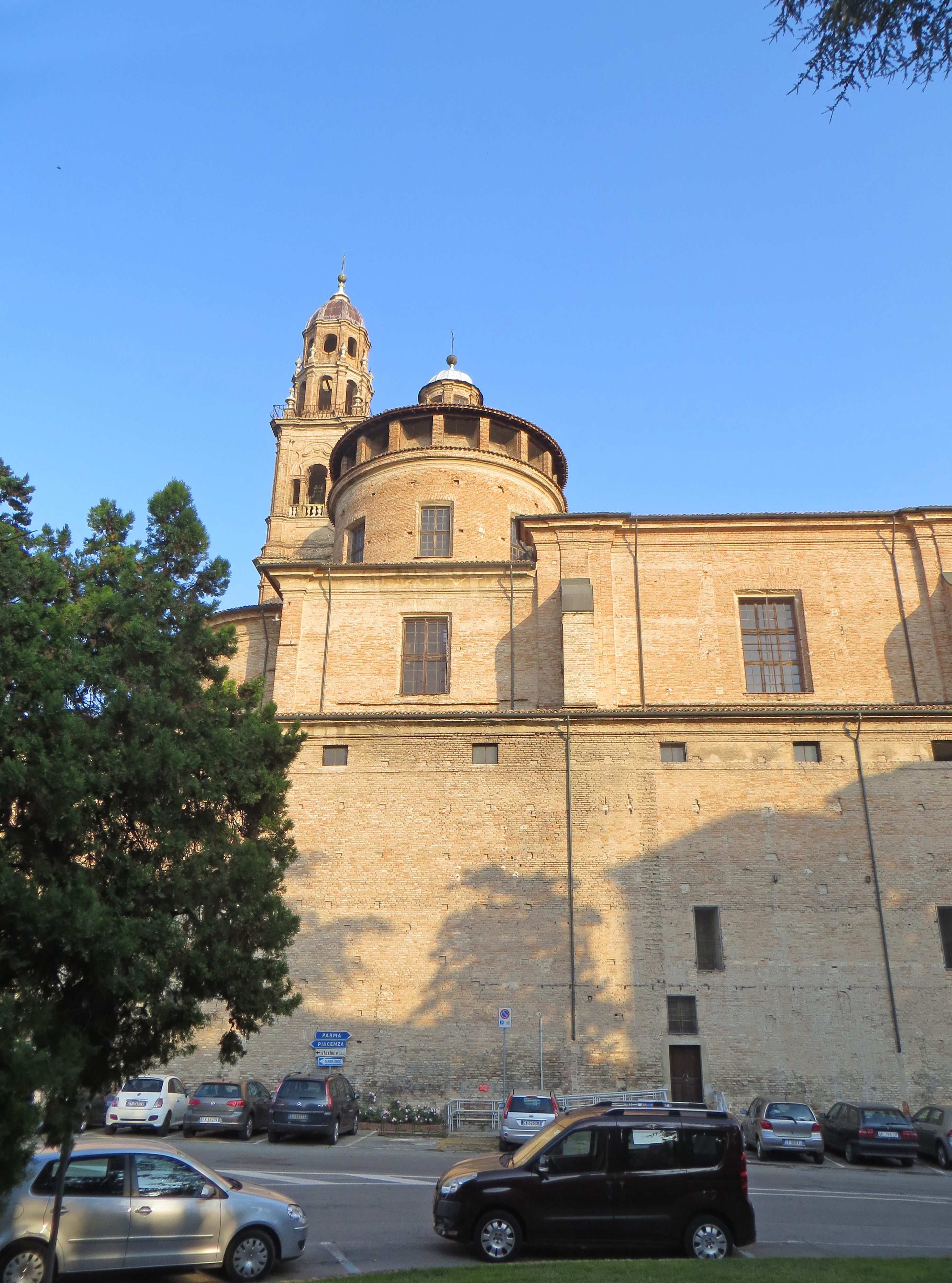 Santuario della Gran Madre di Dio (Fidenza) - lato ovest